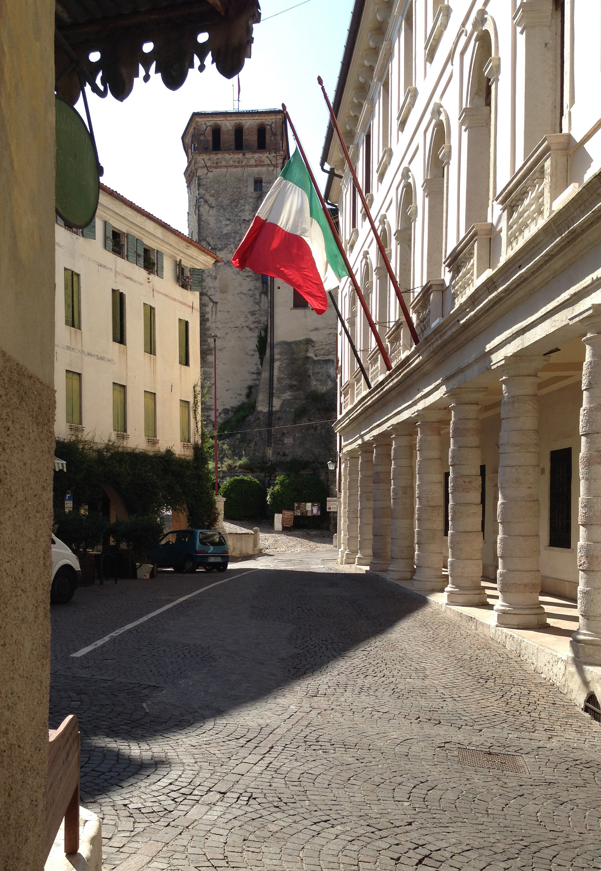 Asolo-Piazza del Municipio, Municipio e Castello Regina Cornaro